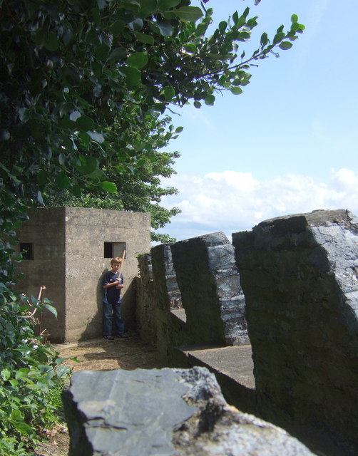 Castle defences